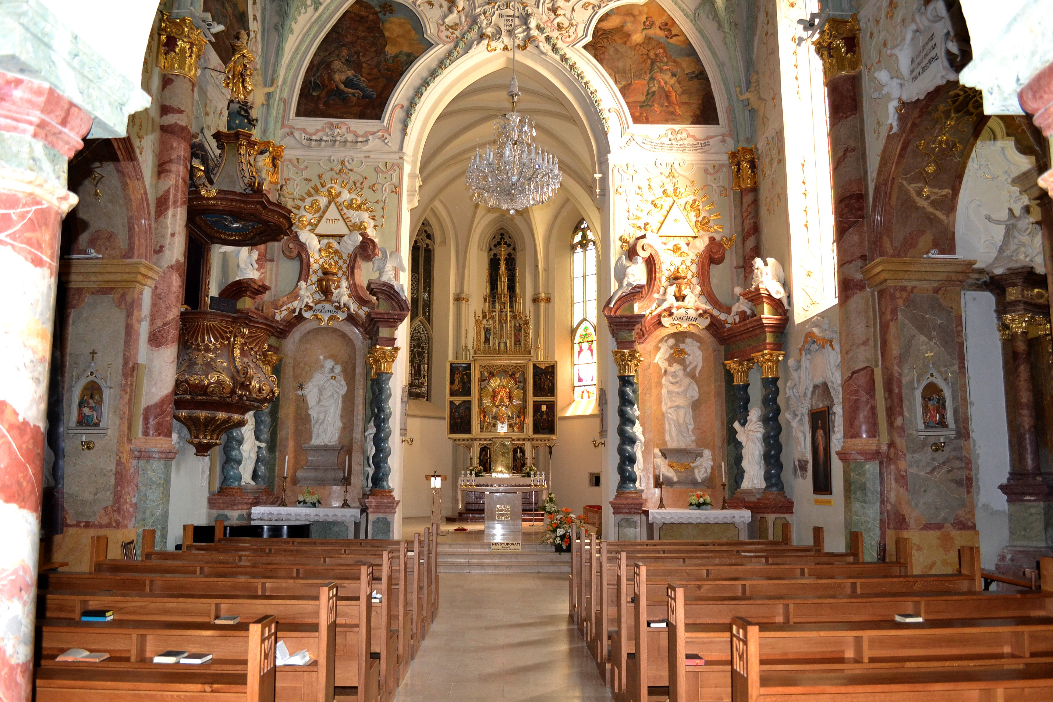 Pohľad do interiéru baziliky